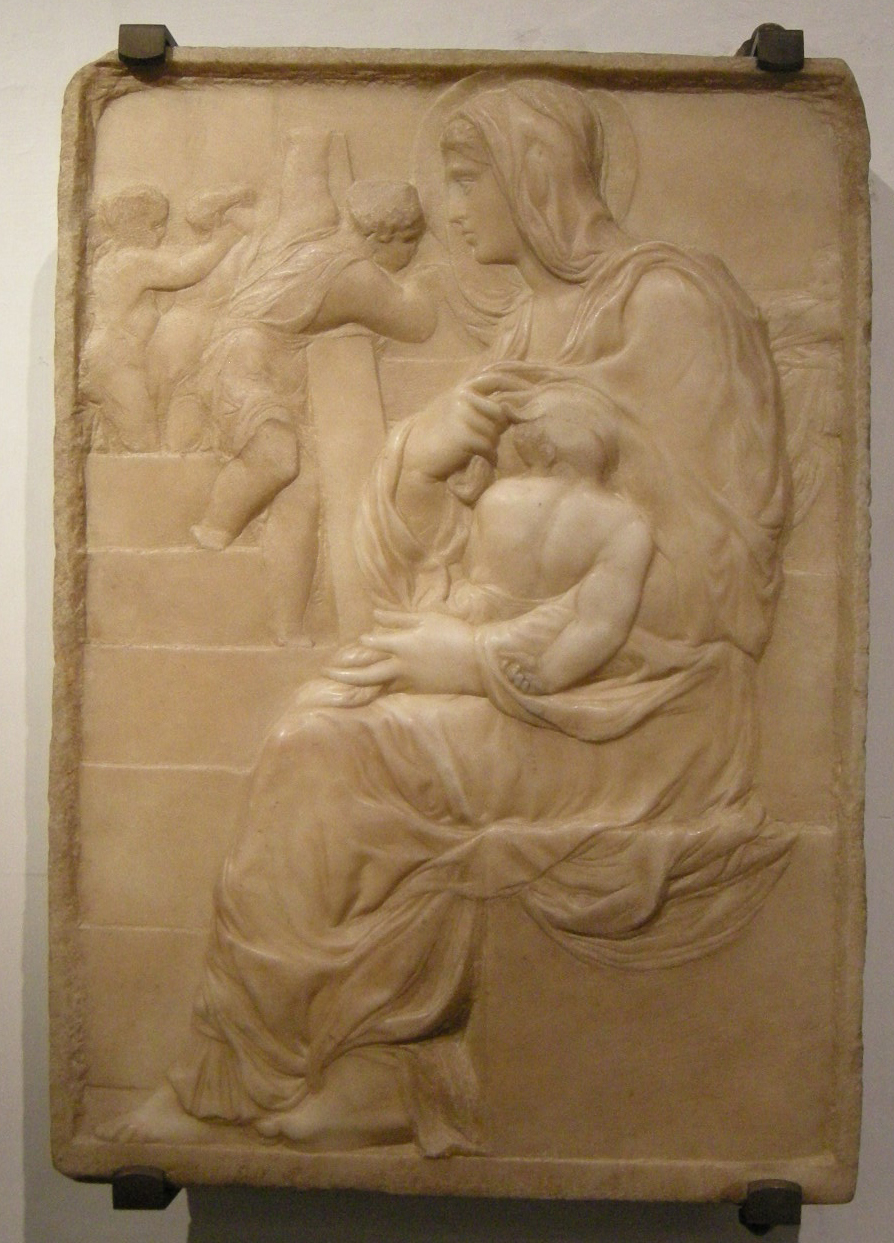 Michelangelo, madonna della scala, 1490 ca.